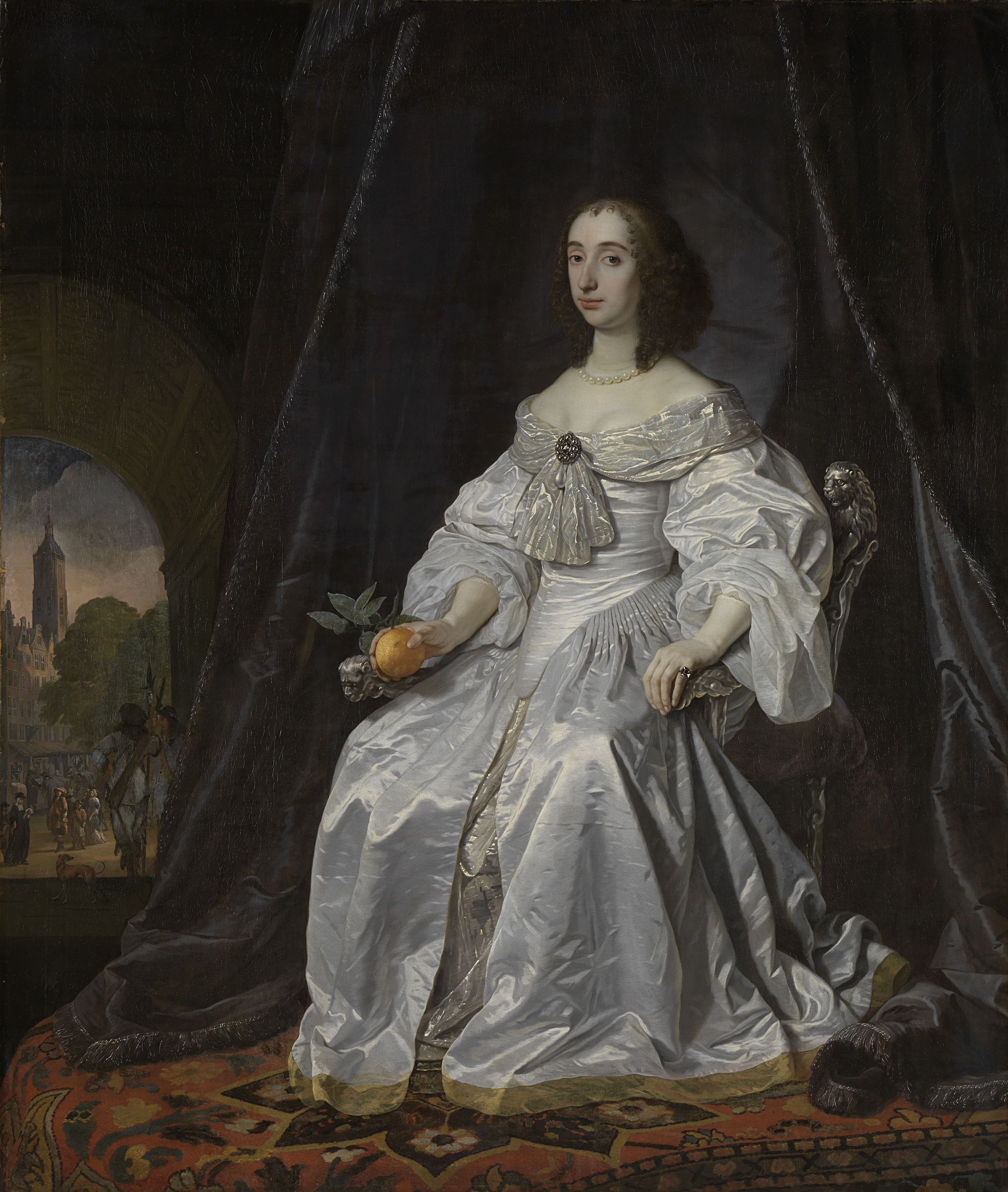 Prinses Maria Stuart (1631-60). Weduwe van Willem II, prins van Oranje. Zittend in een armstoel, ten voeten uit. In de rechterhand een oranjeappel. Links een doorkijk naar de St. Jacobskerk te Den Haag.; Bartholomeus van der Helst (1613–1670), olieverf op doek, 1652